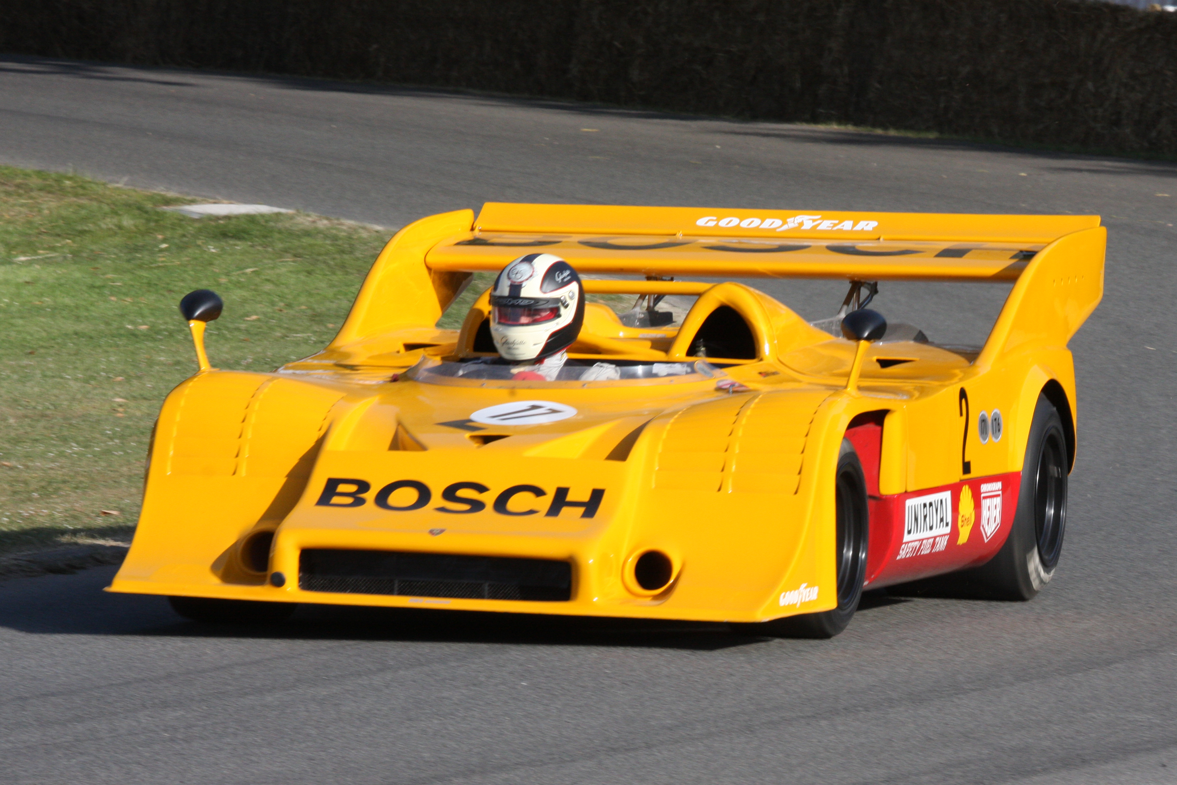 1971 Porsche 917/10 5.0 litre